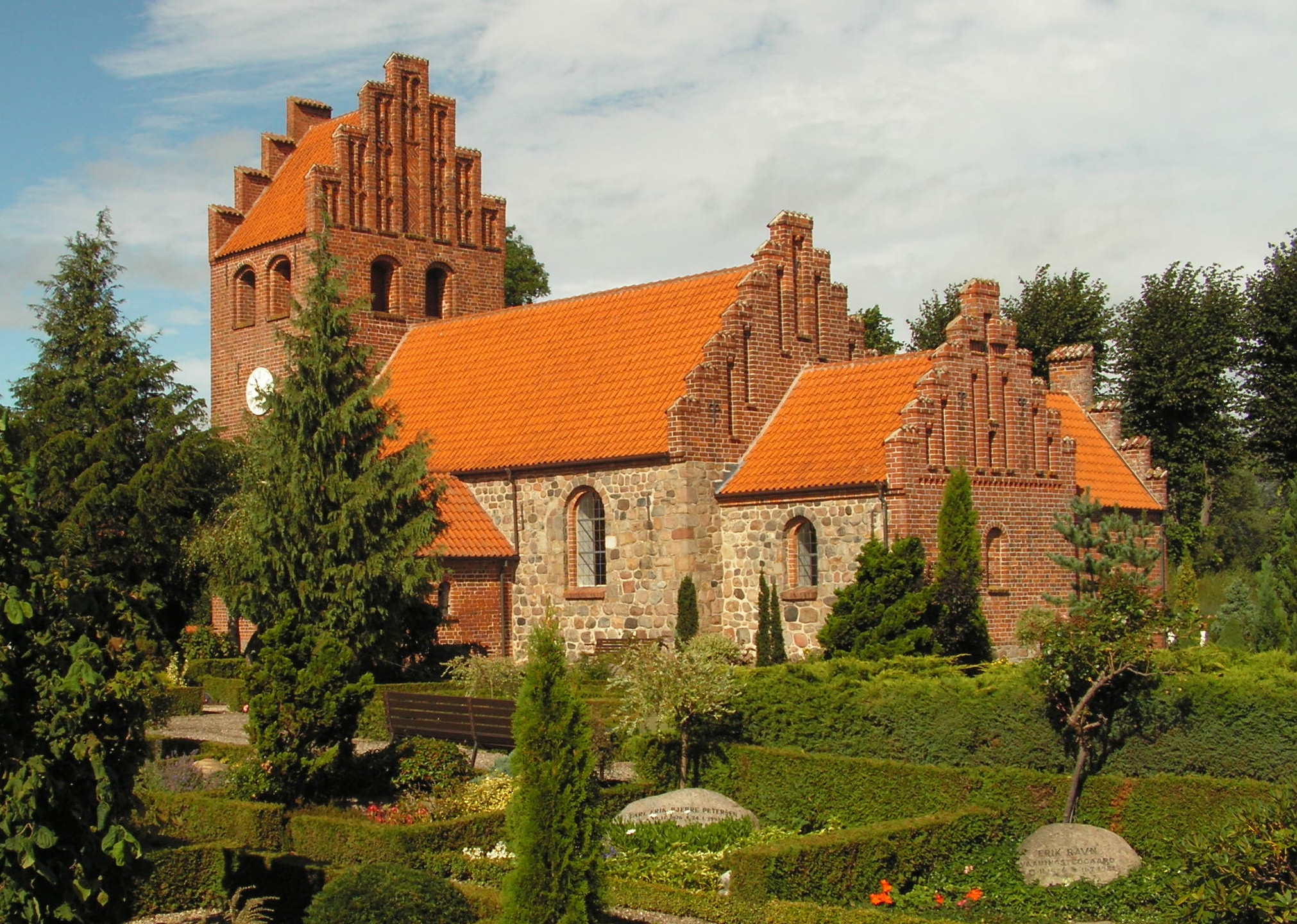 Oppe Sundby Kirke, Frederiksborg, Denmark.